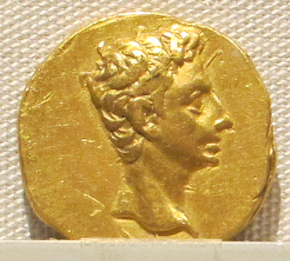 Palazzo Massimo alle Terme